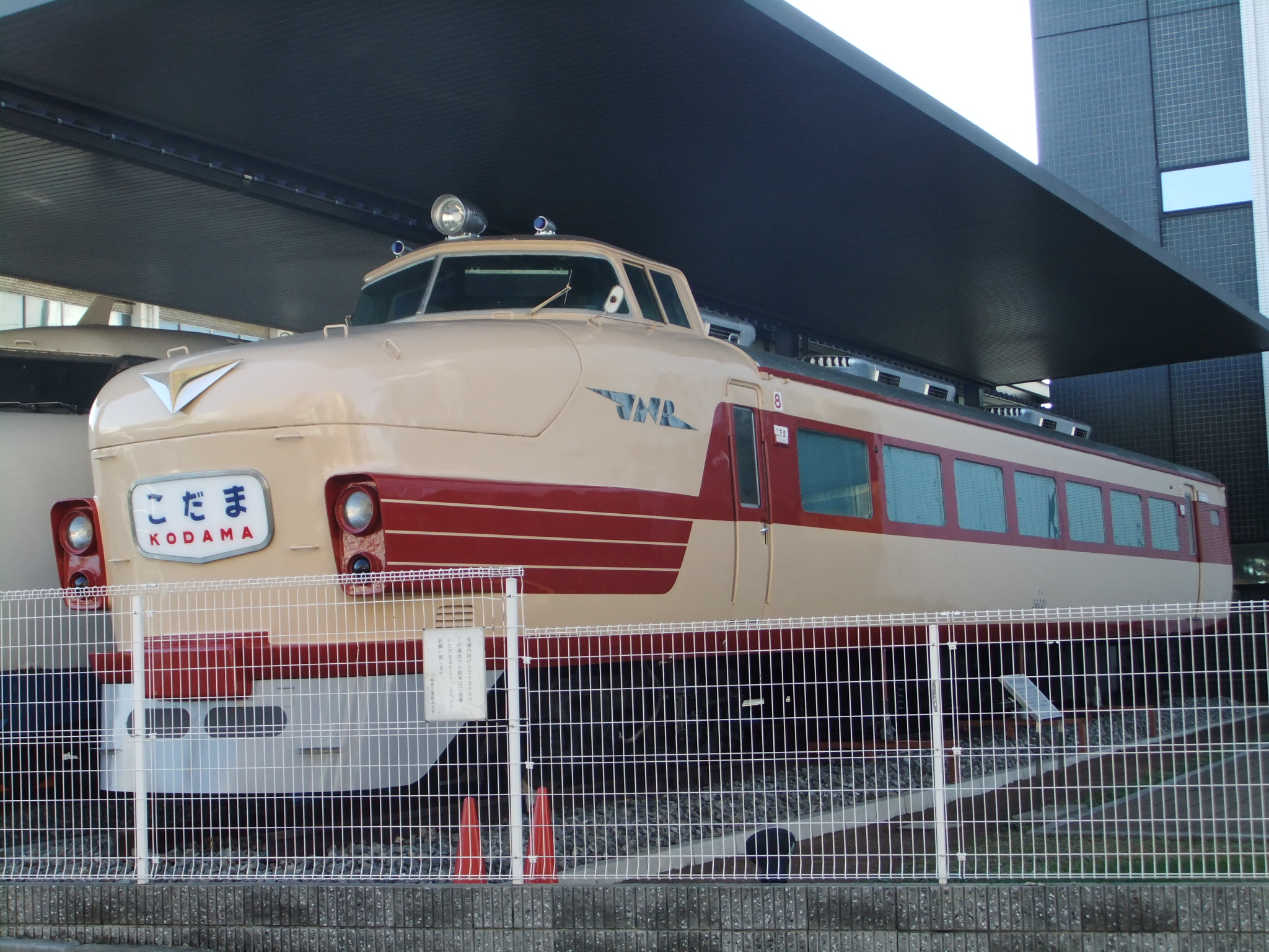 クハ26001 川崎重工業兵庫工場静態保存車